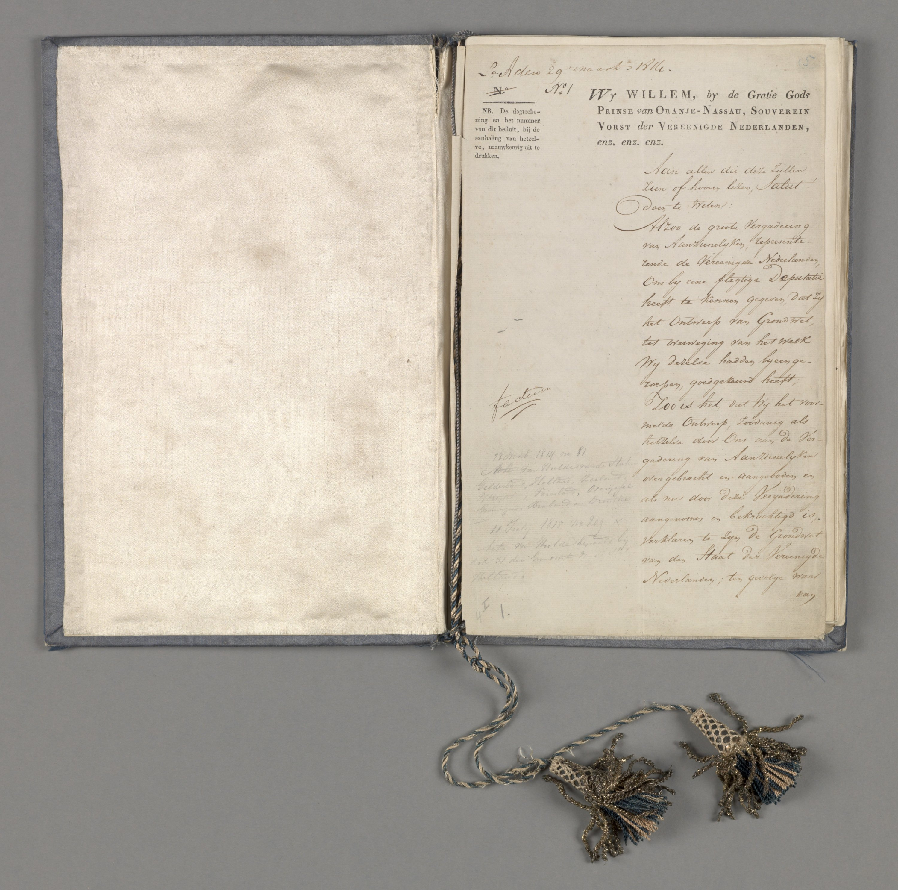 Ontwerp-Grondwet voor de Verenigde Nederlanden